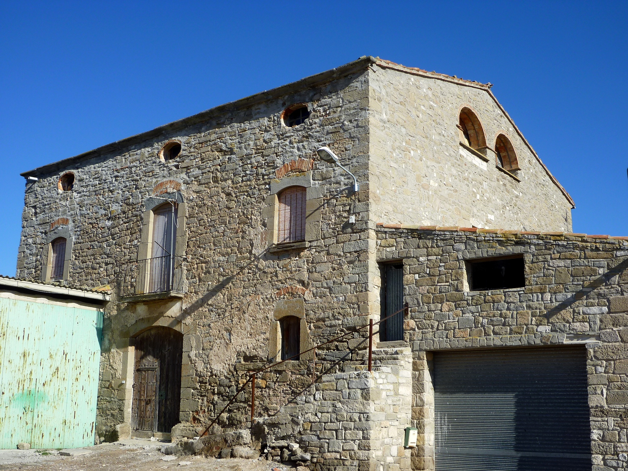 Castell de Gra (Torrefeta i Florejacs): façana posterior